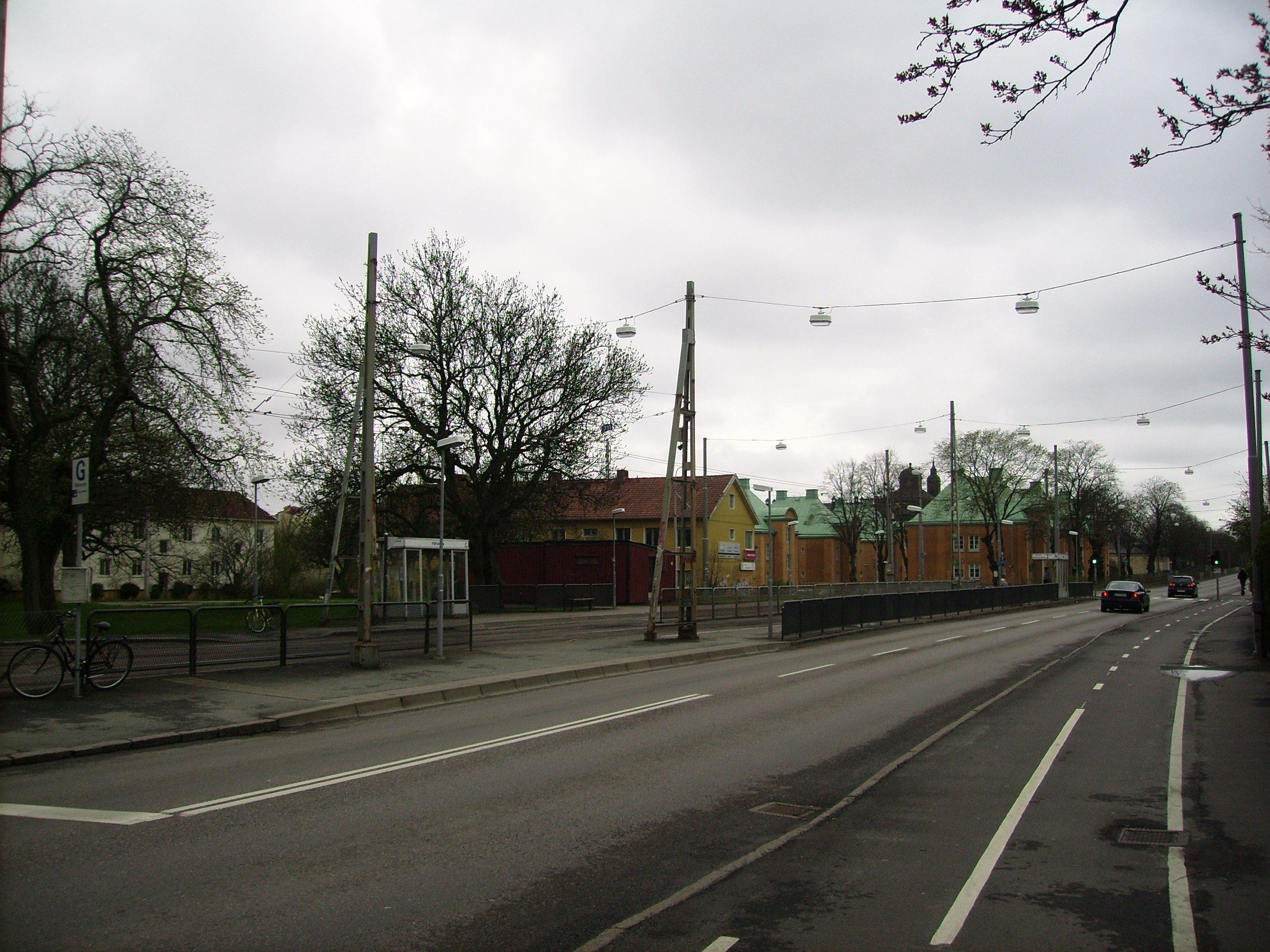 Picture of Härlandavägen in Gothenburg.